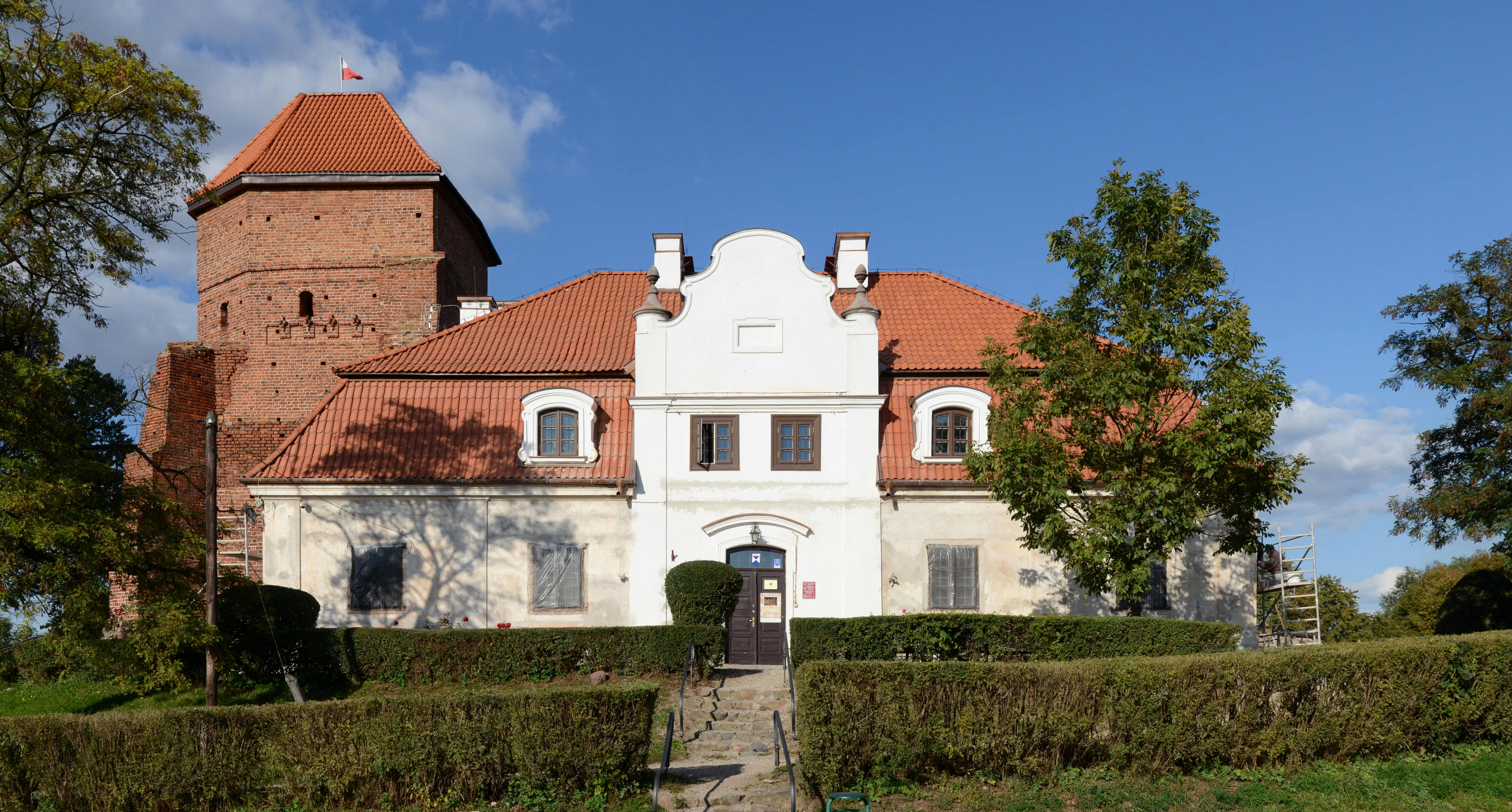 Dwór i wieża bramna zamku w Liwie podczas renowacji w 2012 r.